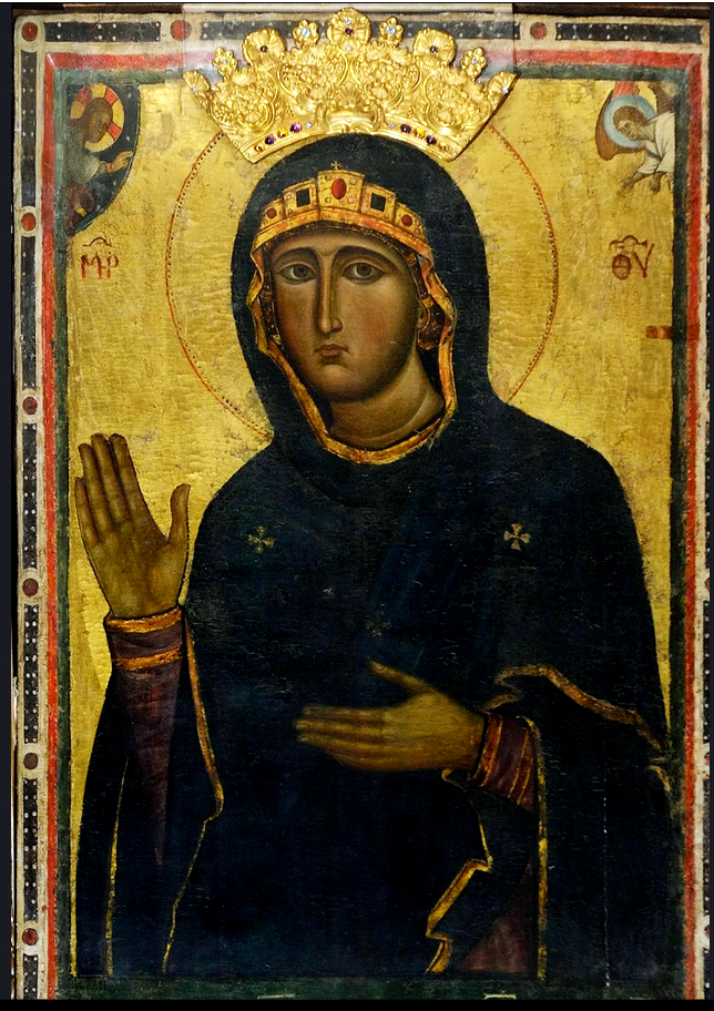 Hagiosoritissa